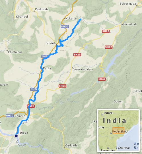 carte réalisée sur umap.openstreetmap, This map may be incomplete, and may contain errors. Don't rely solely on it for navigation.